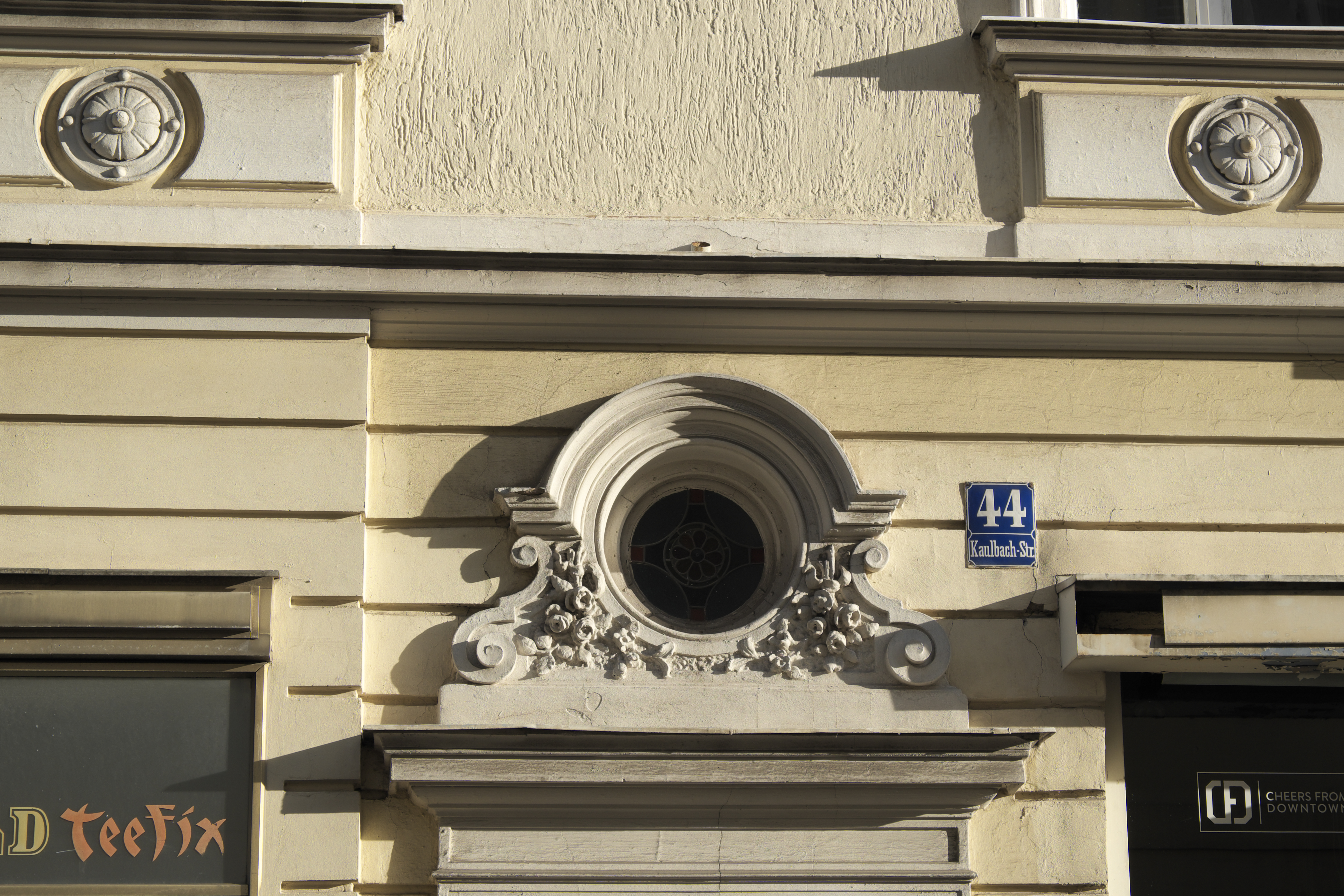 Mietshaus in der Kaulbachstraße 44 im Stadtbezirk Maxvorstadt in München (Bayern/Deutschland), Ende 19. Jahrhundert